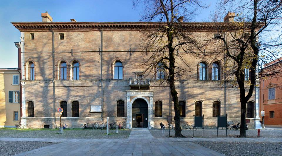 Facciata del Palazzo dei Principi.